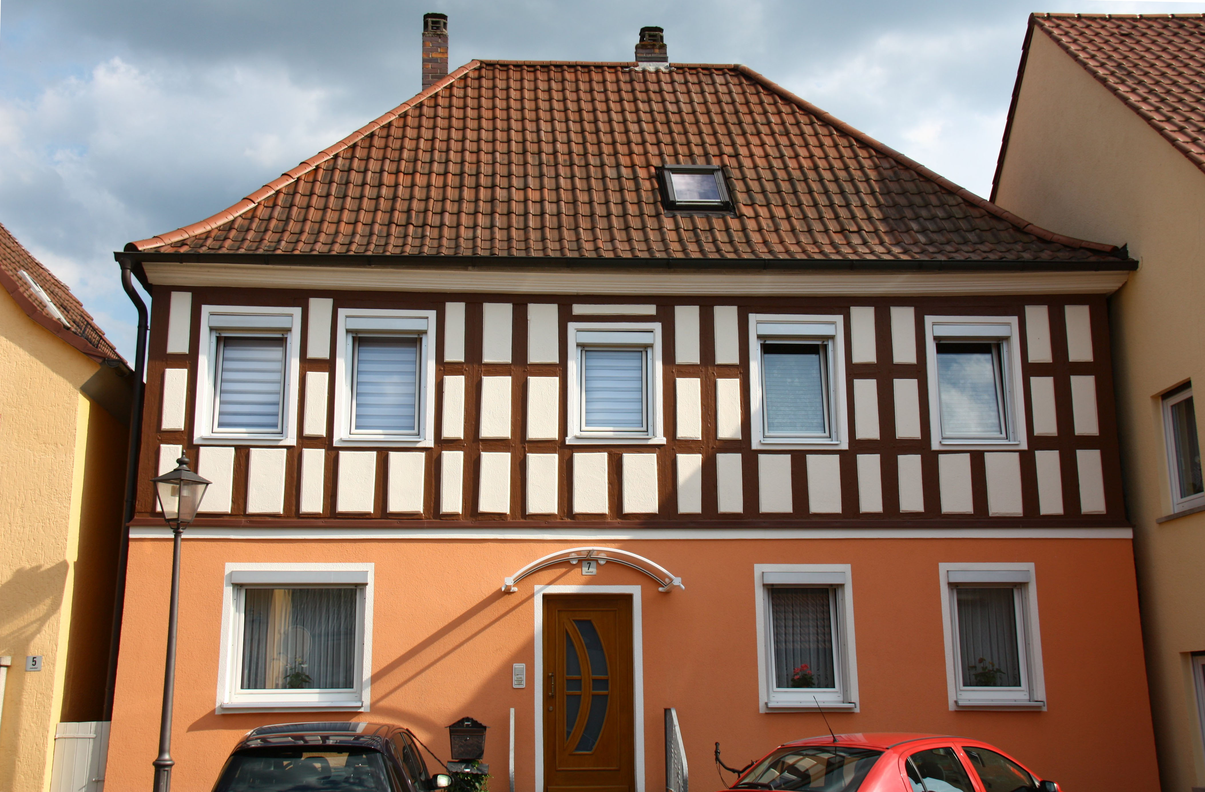 Walmdachhaus in Altenkunstadt